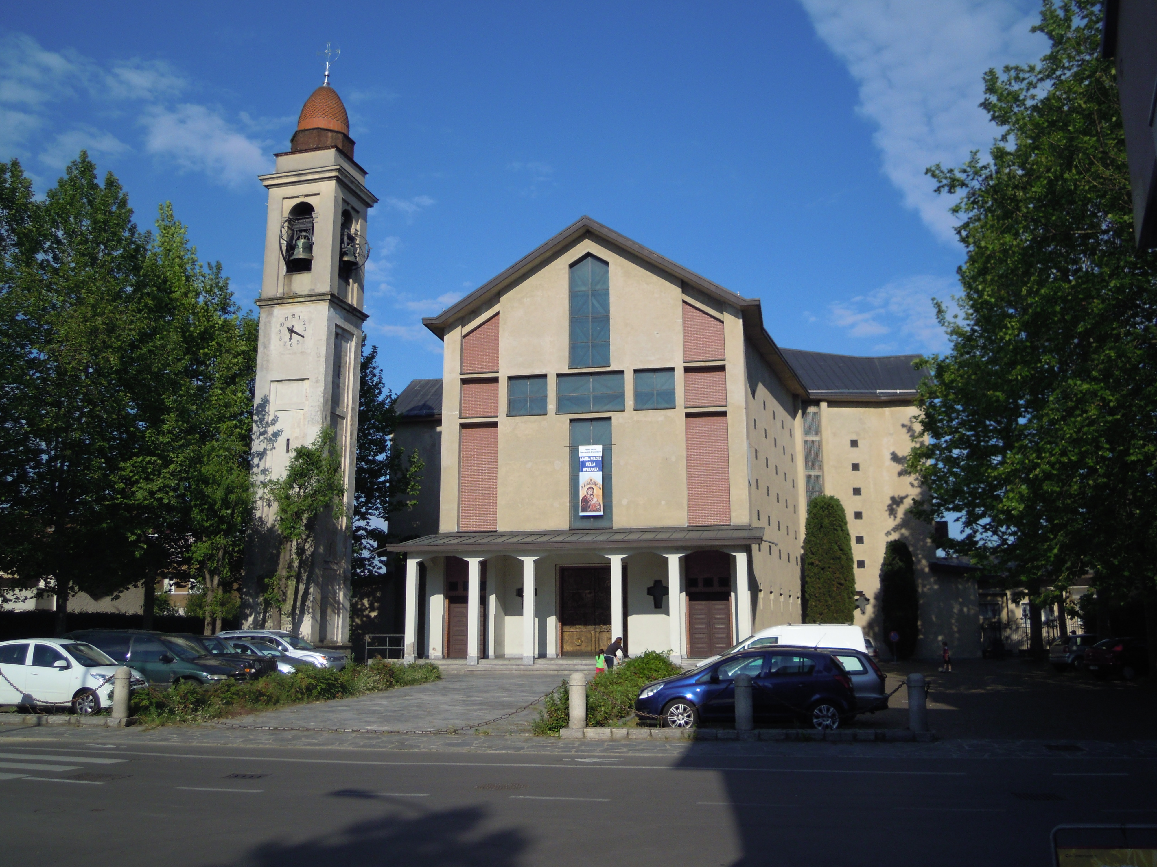 Chiesa Parrocchiale Natività di Maria Vergine a Verghera di Samarate (VA)